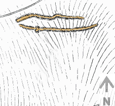 Die Wendehai-Wälle im Elm, Skizze (Ausschnitt) aus dem Buch Braunschweiger Volkskunde, Richard Andree, 1901